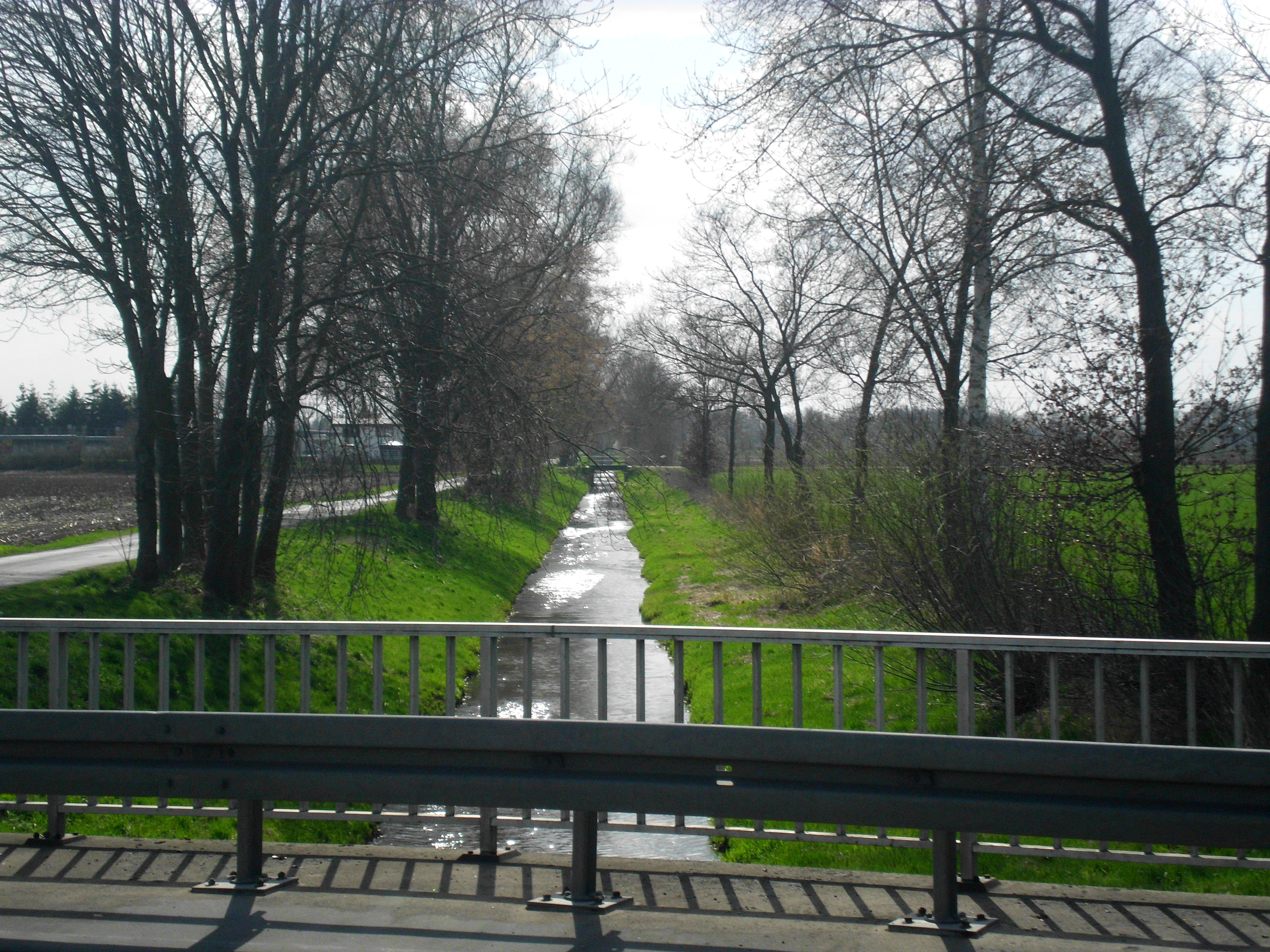 Wagenfelder Aue Blickrichtung Süd auf der Brücke in Wagenfeld